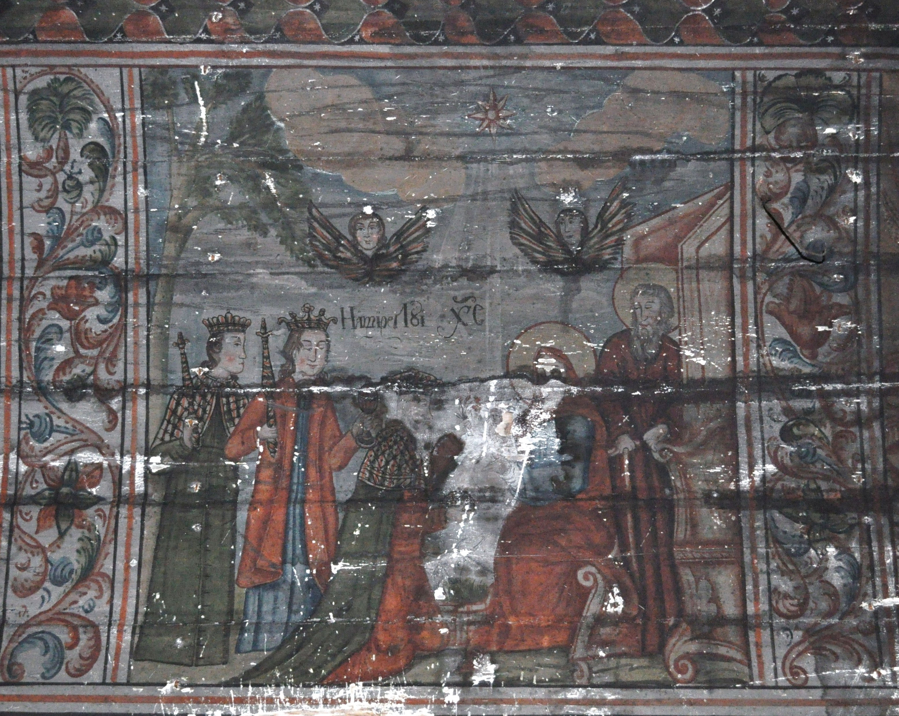 Biserica de lemn din Osoi